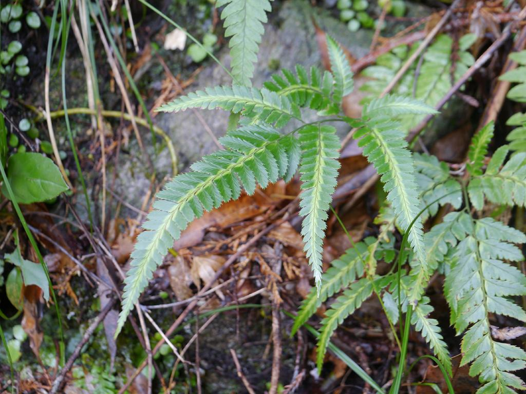 Arachniodes simplicior：ハカタシダ 2017/01/09 和歌山県田辺市：Tanabe City. Wakayama Pref. Japan